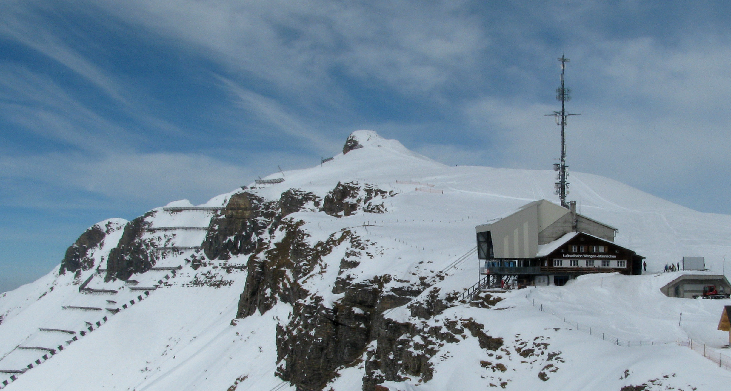 Gipfel Männlichen und Bergstation der Luftseilbahn Wengen-Männlichen, feb 09